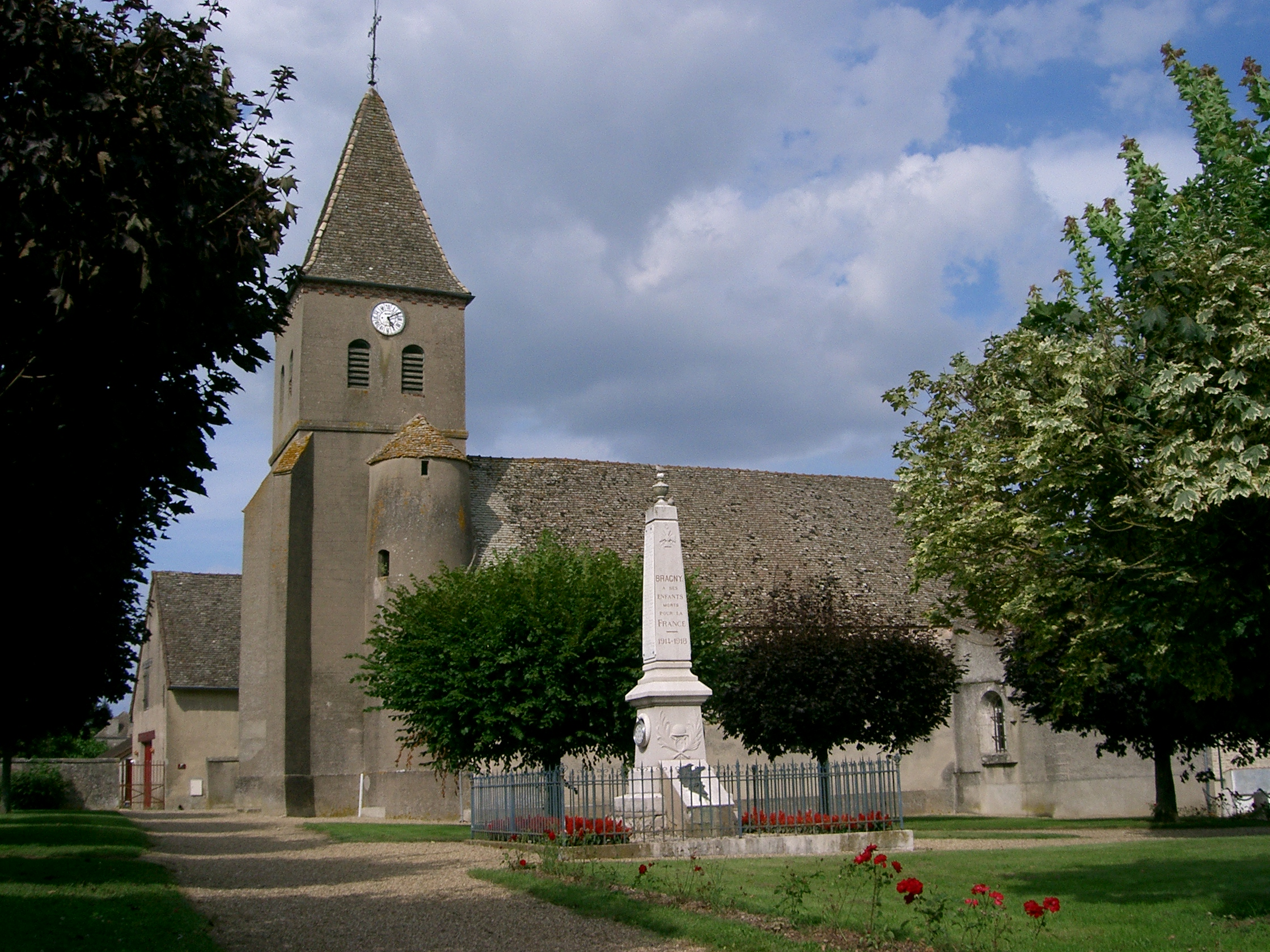 Bragny-sur-Saône (Saône et Loire - France)- église